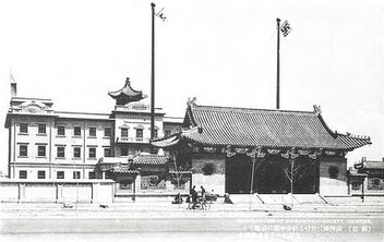 The Red Swastika Society of Manchuria（世界红卍字会满洲总会）